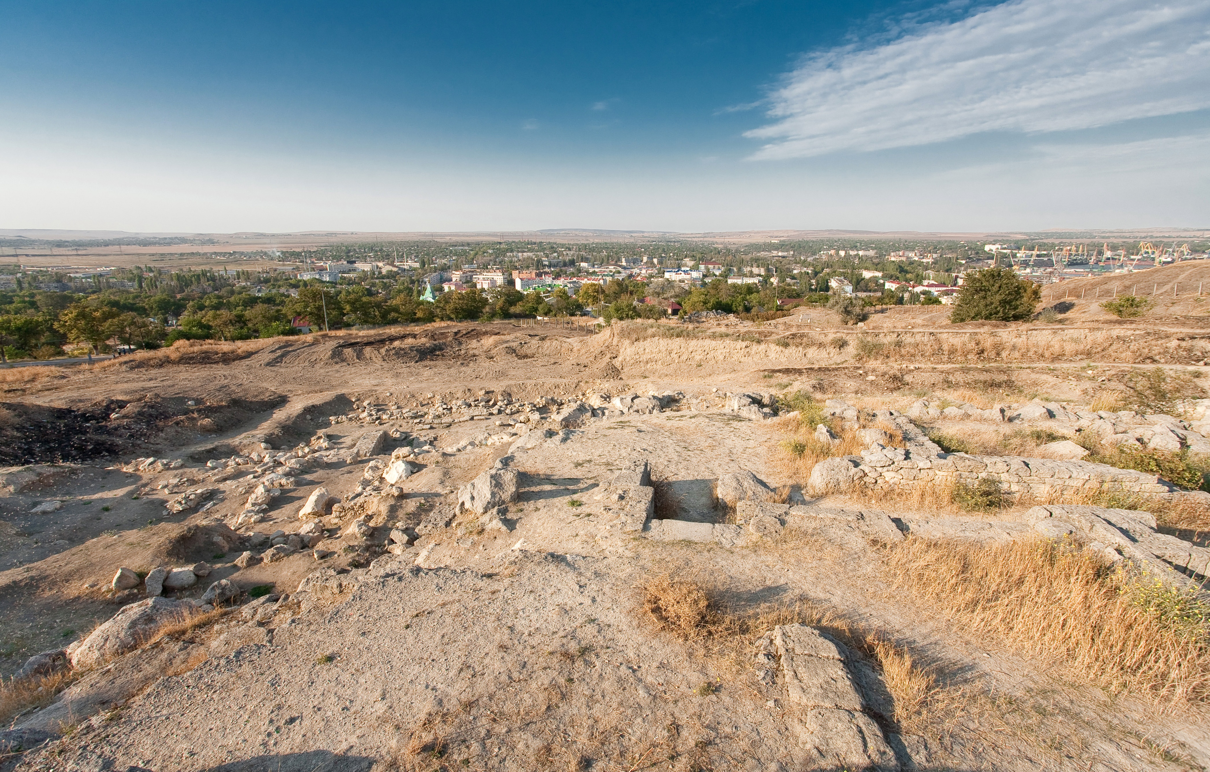 Керч вул. Рибакова, гора Мітрідат, північний та північно-східний схили